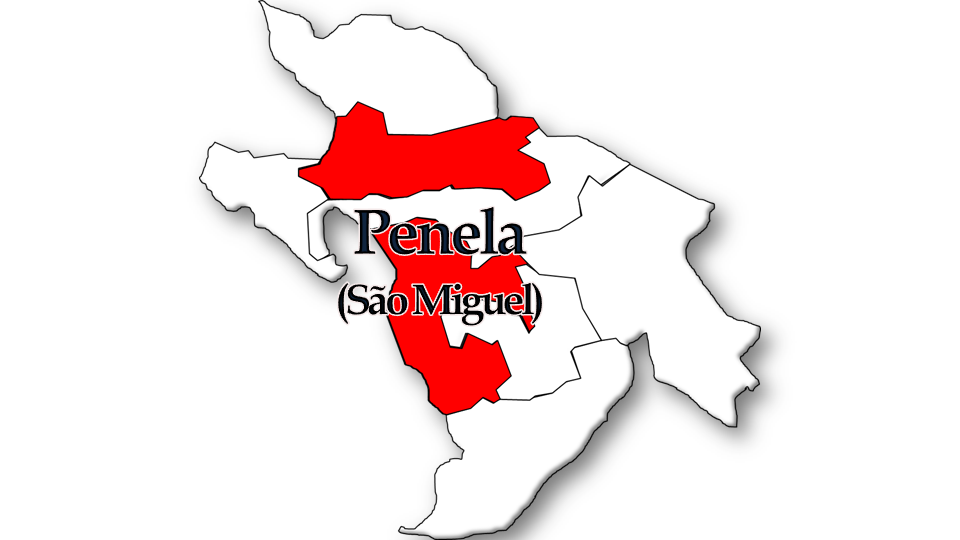 População